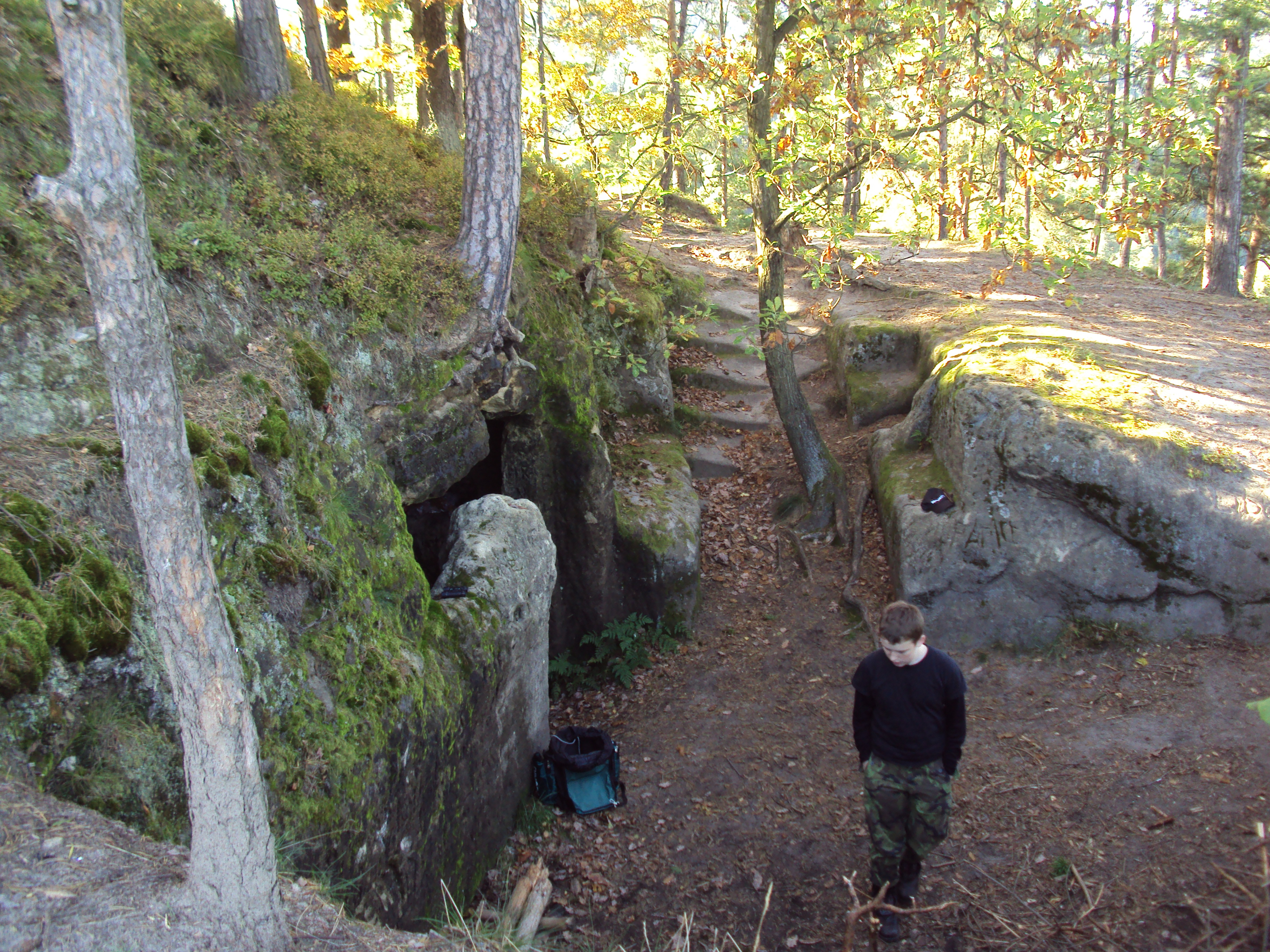 Přírodní památka Stohánek 4km jižně od Hamr na Jezeře, vrcholová partie